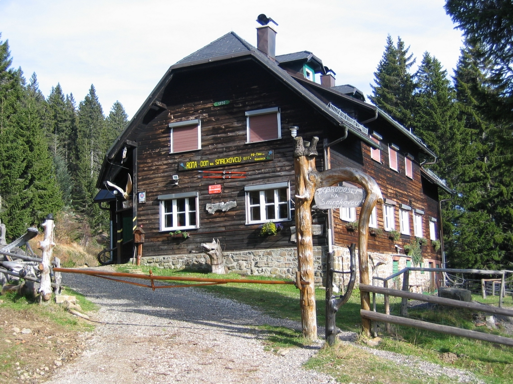 Dom na Smrekovcu